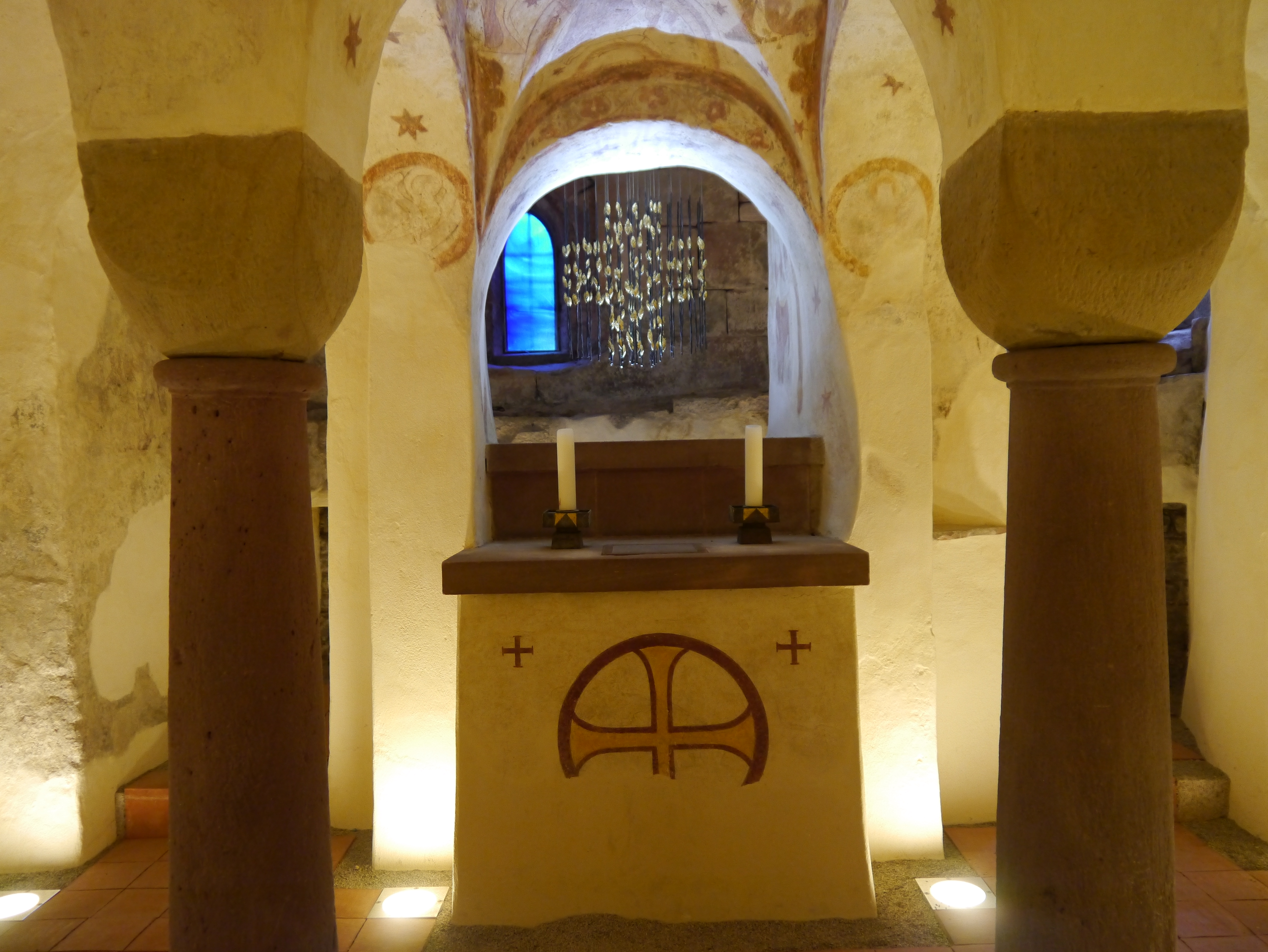 Krypta von St. Gallus (Ladenburg) mit Kreuz von Hans-Michael Kissel.